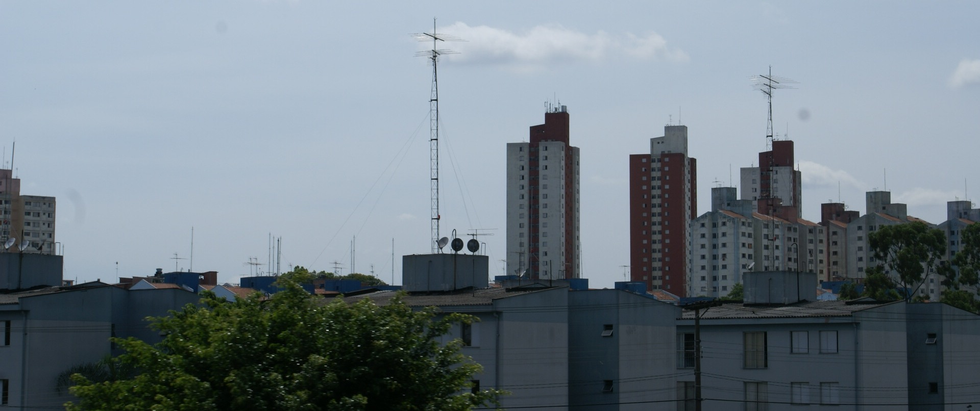 Edifícios populares em Heliópolis, São Paulo, Brasil - Buildings in Heliópolis neighborhood, São Paulo, Brazil